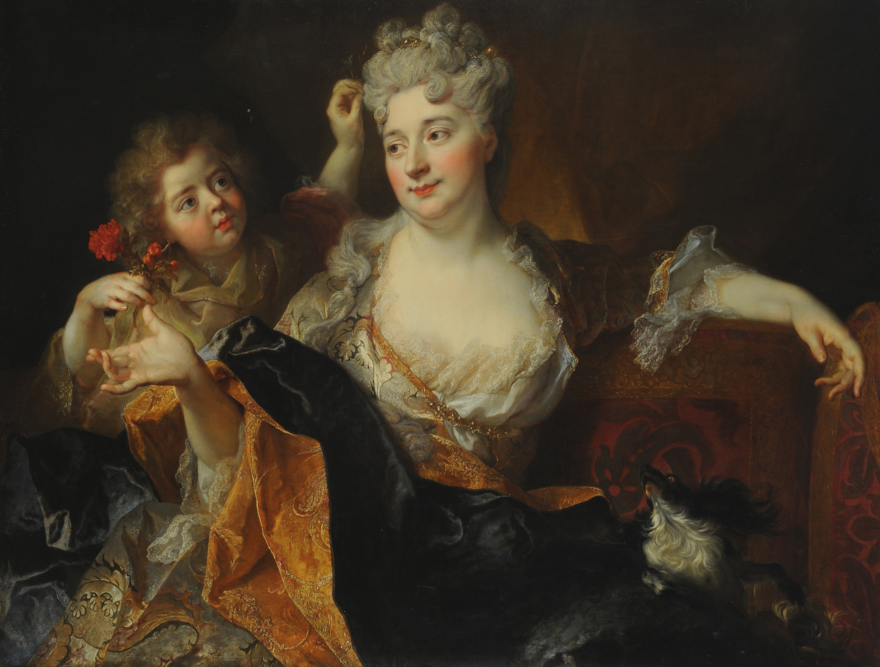 Retrato de Marguerite-Elisabeth Forest de Largilliere y su hijo Nicolás - (Tít. ant.: Madre e Hija)